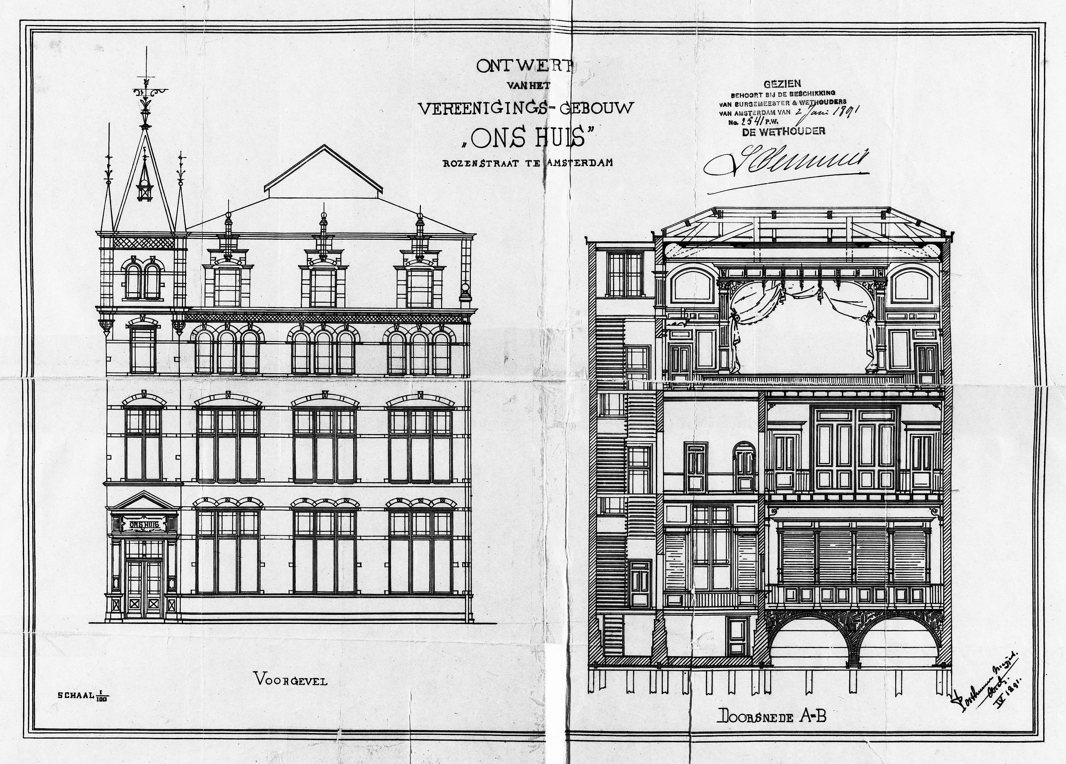 Bouwtekening "Ons Huis" Rozenstraat te Amsterdam